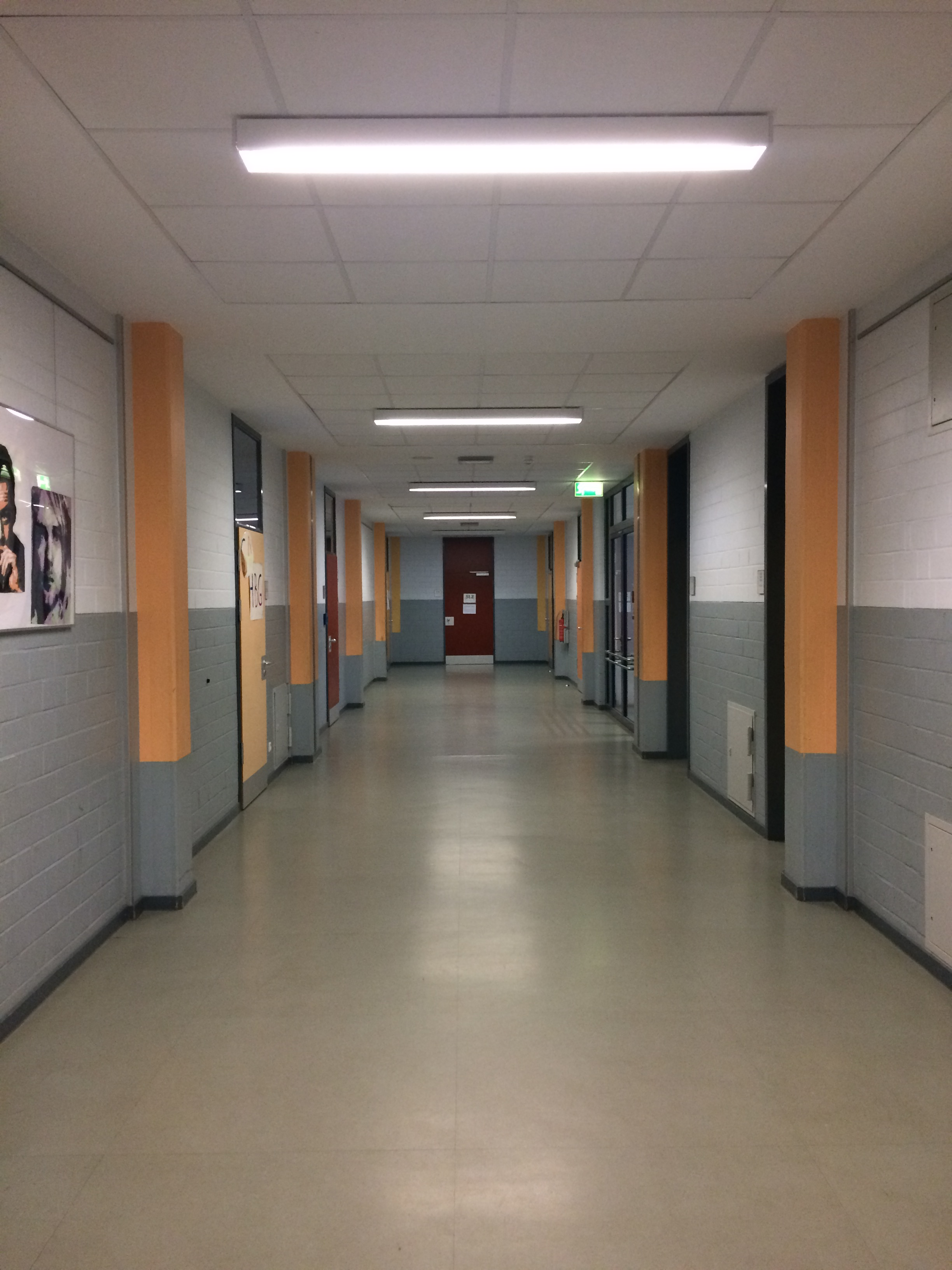 Der Flur des Hardtberg-Gymnasiums im B-Trakt